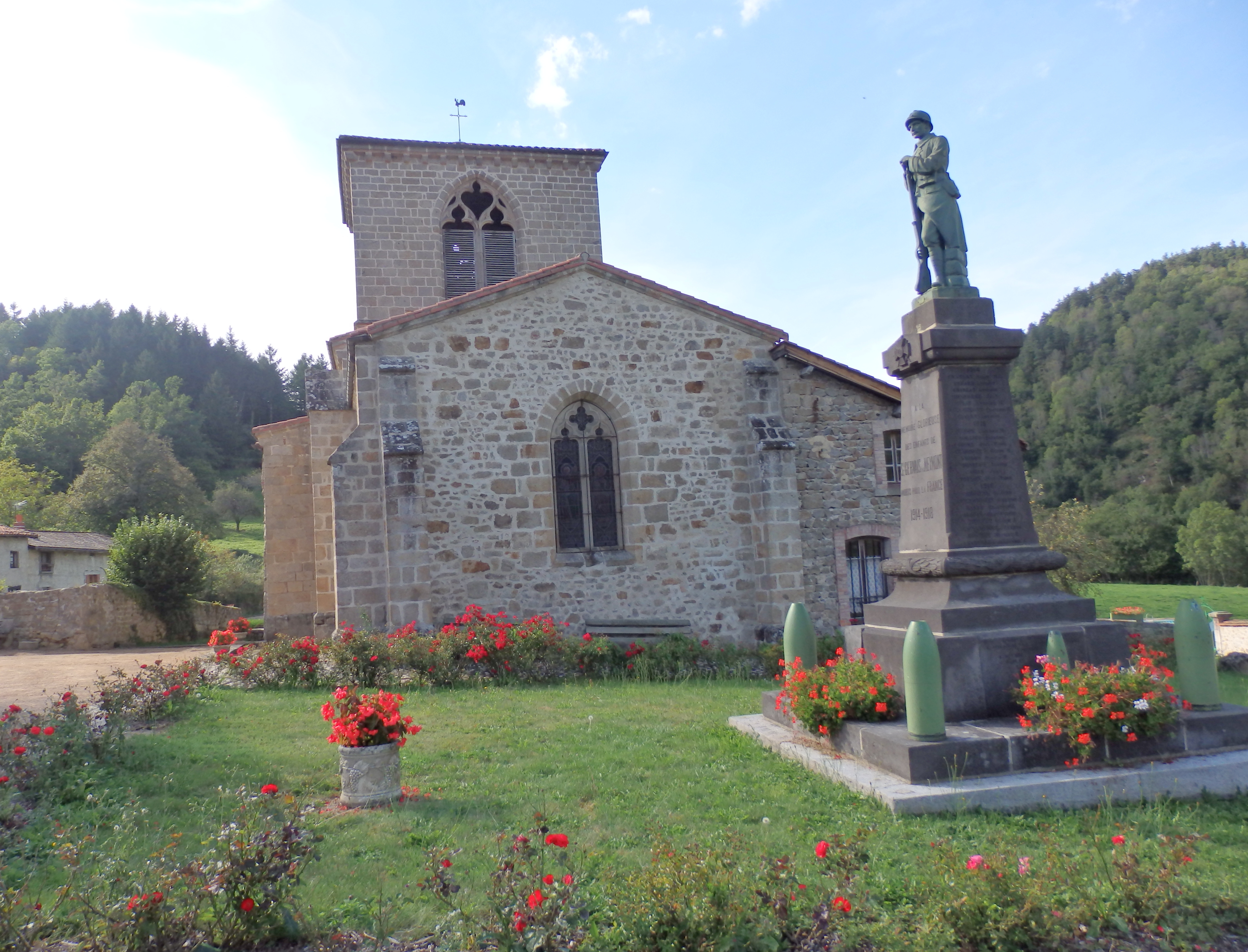 Église Saint-Gervais-et-Saint-Protais de Saint-Gervais-sous-Meymont .